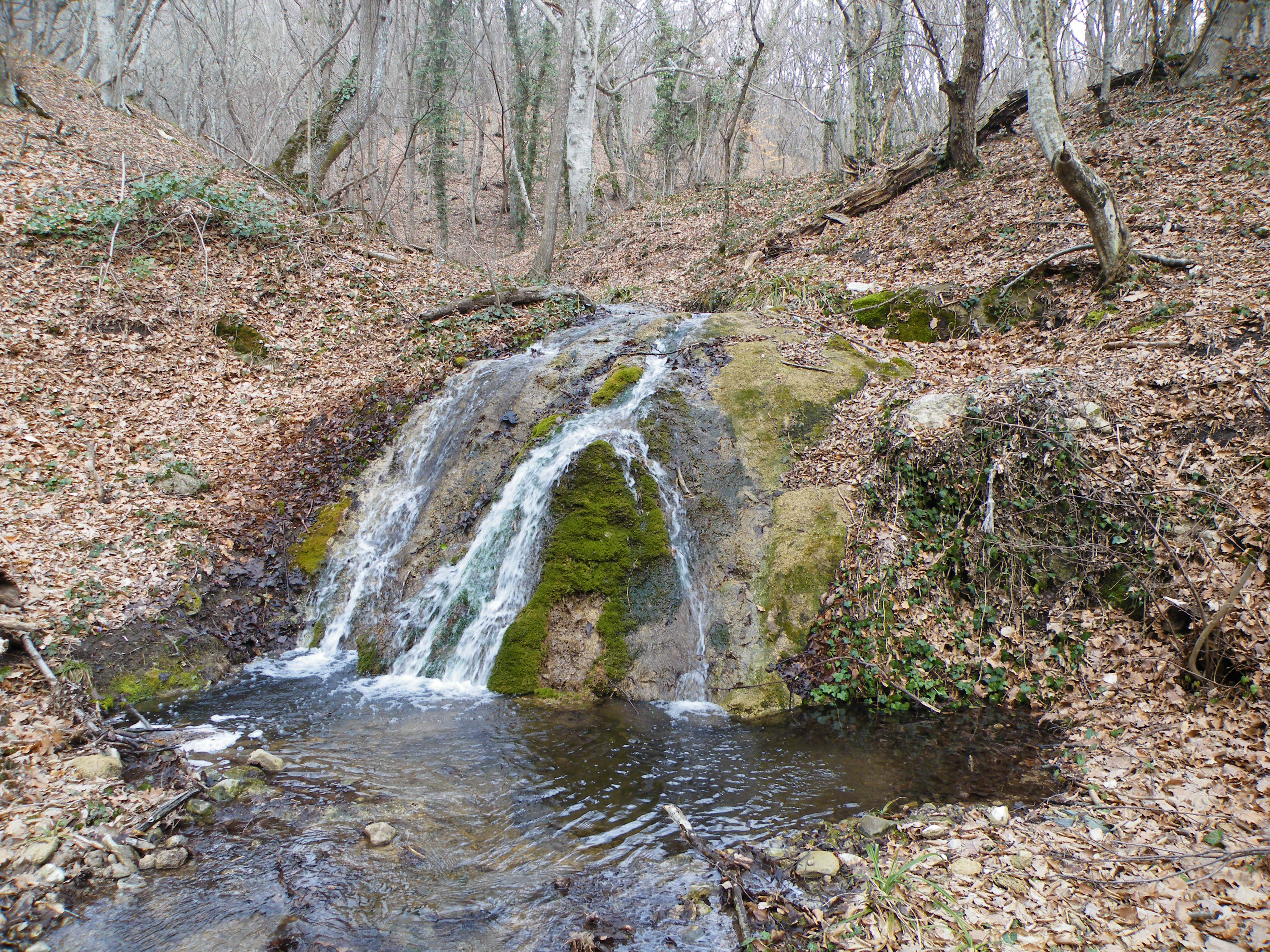 Кабакташский ручей. Крым